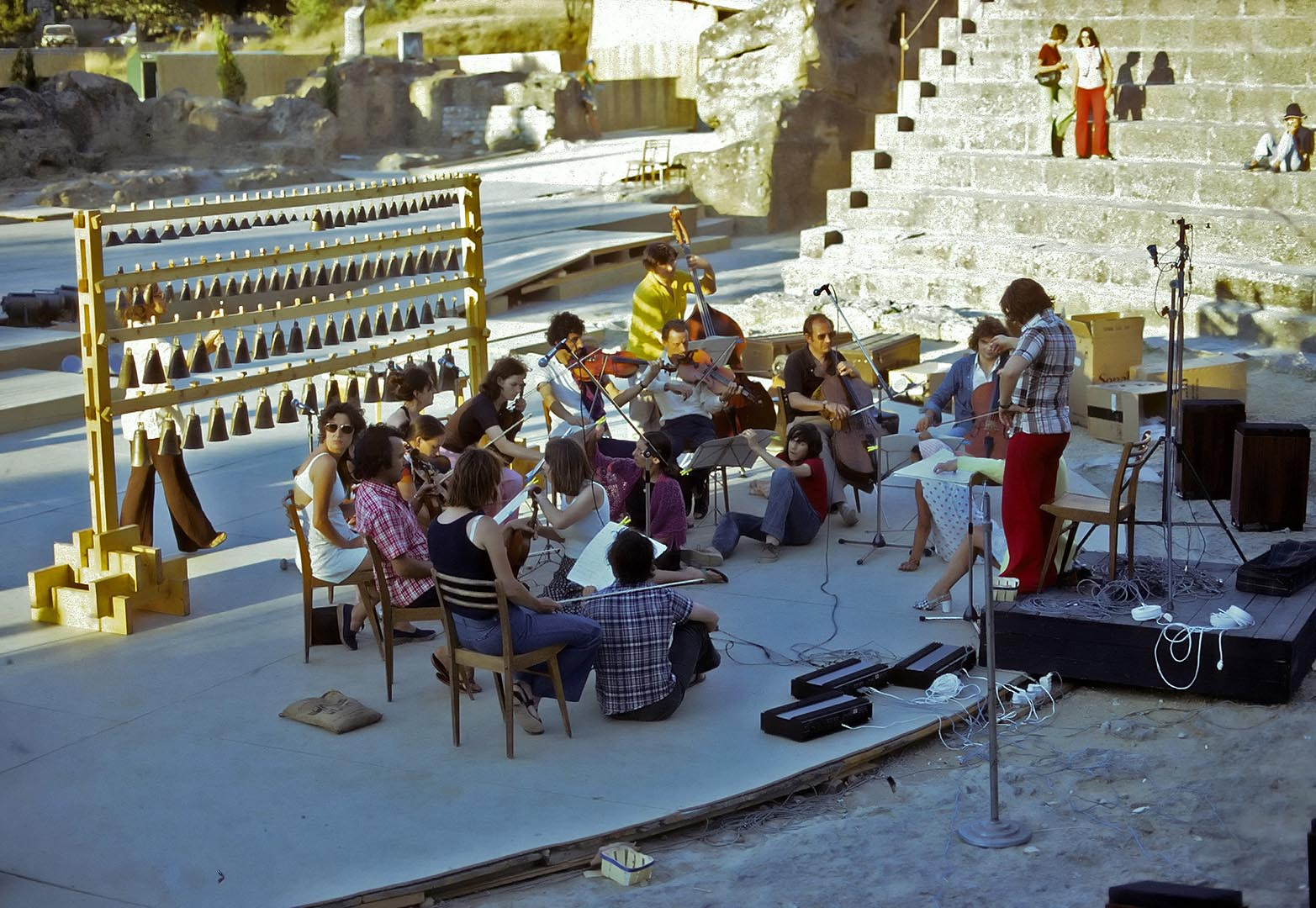 Répétition d'un orchestre au théâtre antique de Vaison